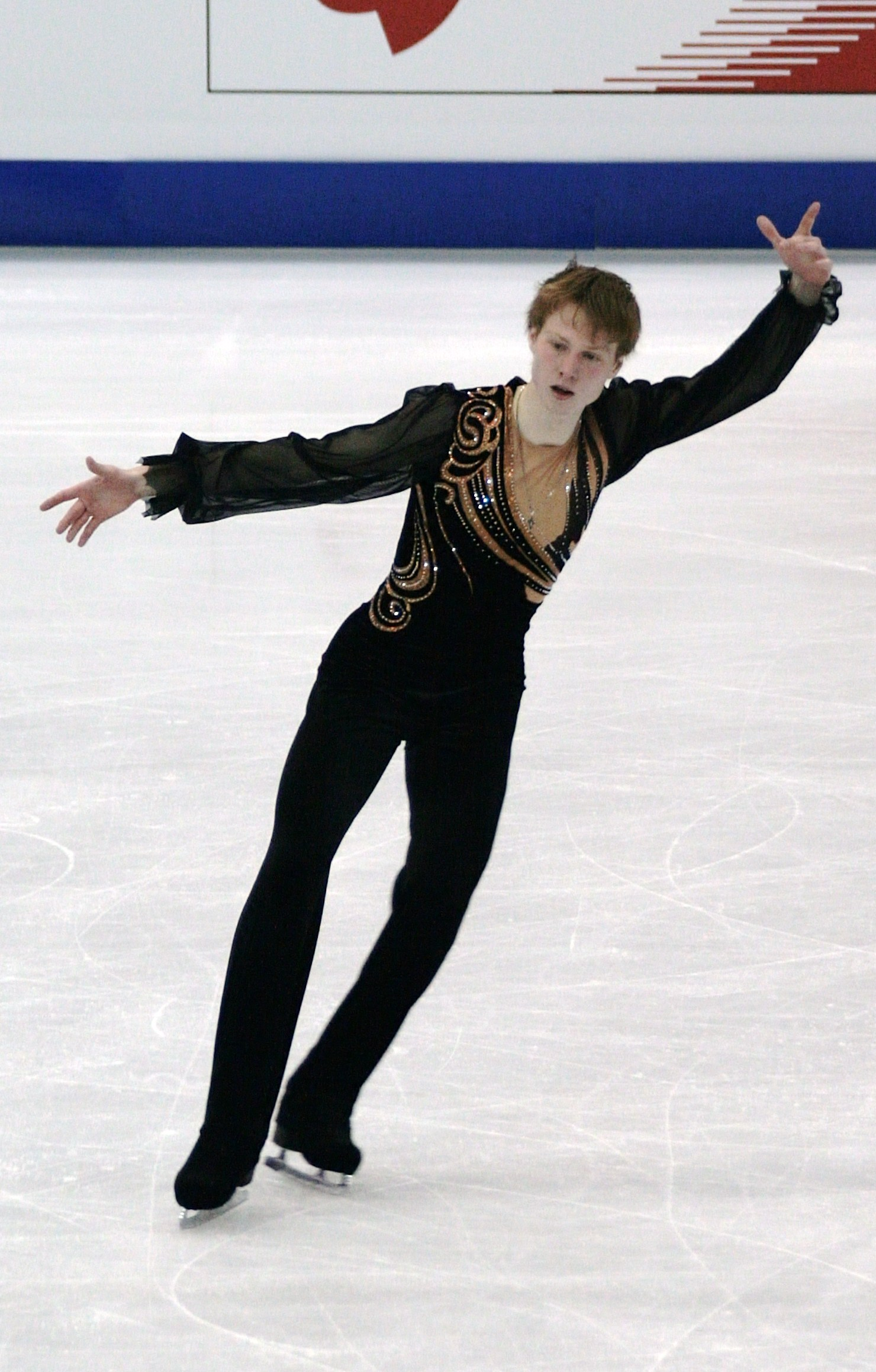 Виталий Лучанок (Белоруссия) на чемпионате мира по фигурному катанию 2012